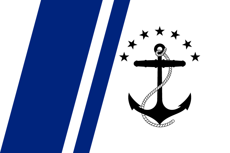 logo del comando de guardacostas de Venezuela